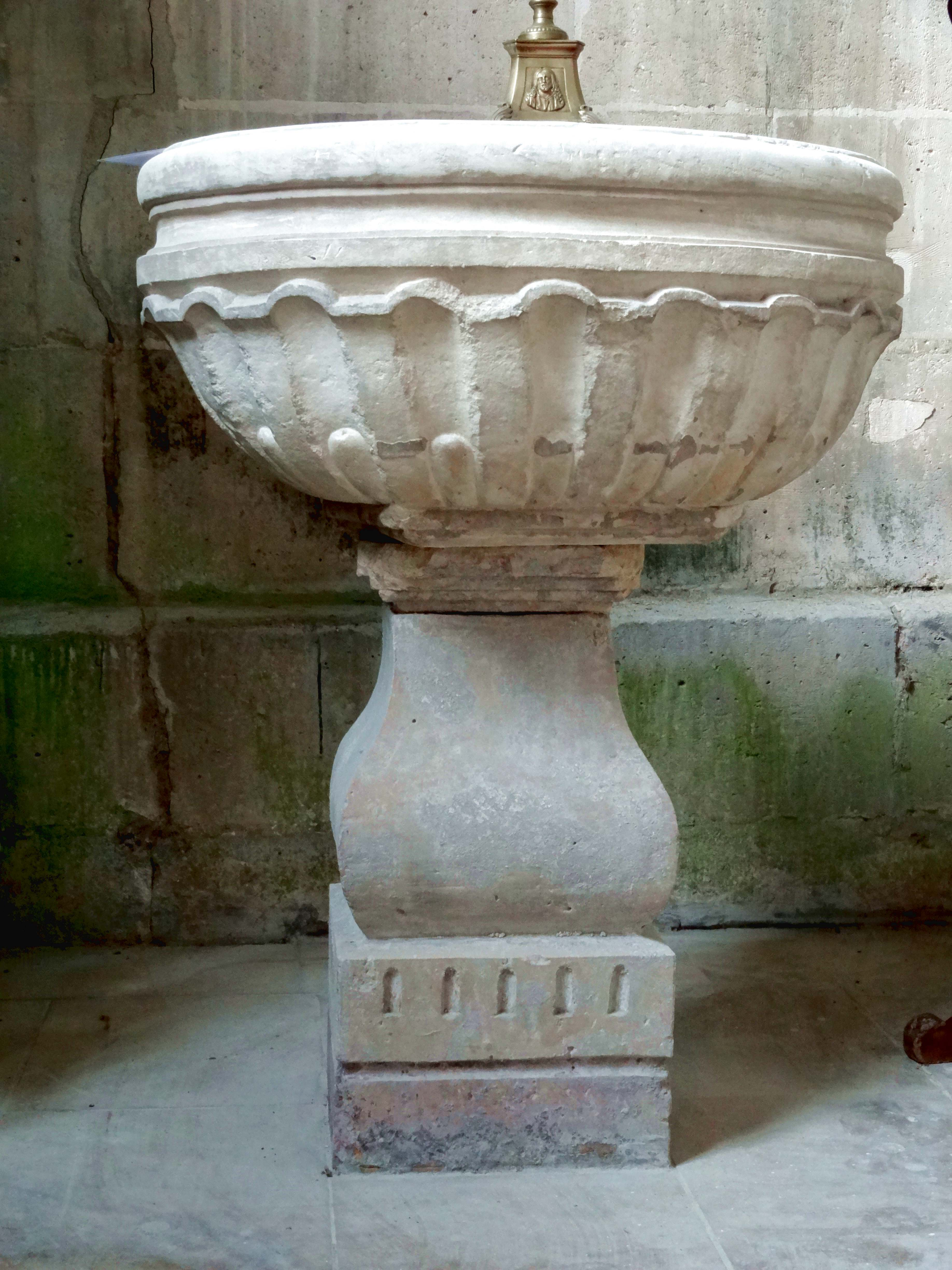 Mobilier de l'église - voir titre.